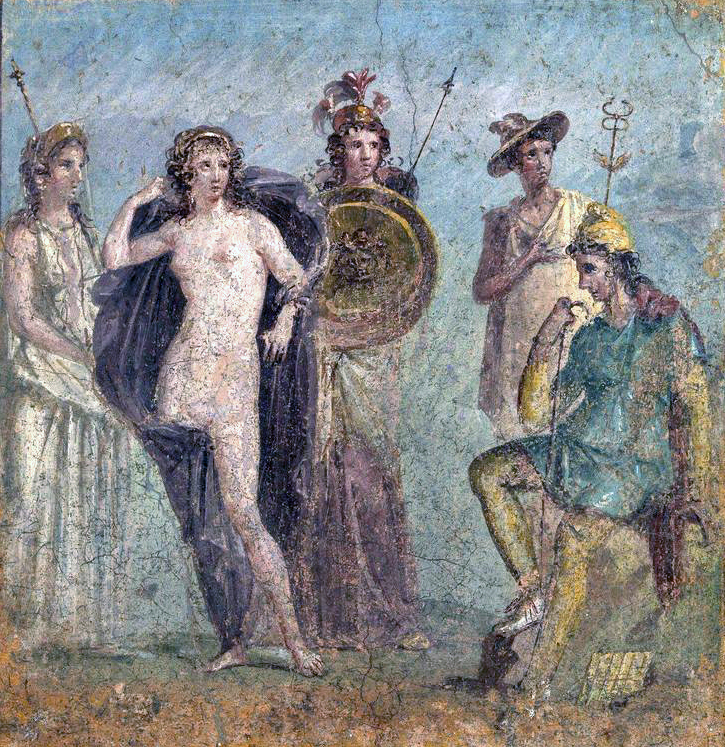 Roman, made in Pompeii, A.D. 45–79. Fresco; found in the House of Jupiter at Pompeii. Soprintendenza Speciale per i Beni Archeologici di Napoli e Pompei.